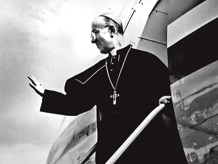 Saludo del Cardenal Antonio Samoré, al llegar a la Argentina a fines de 1978.